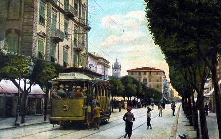 La Spezia, corso Cavour